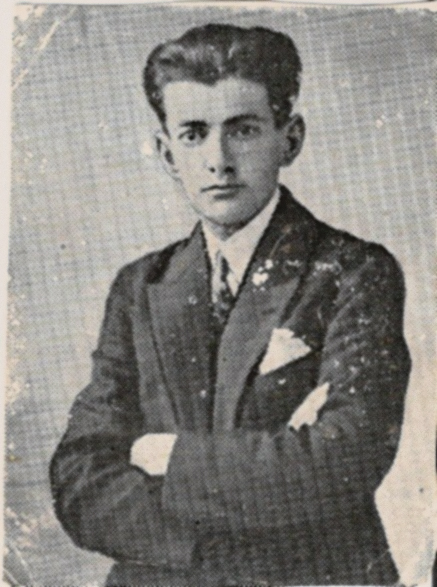 Portrait de l'écrivain François [Fanch] Abgrall